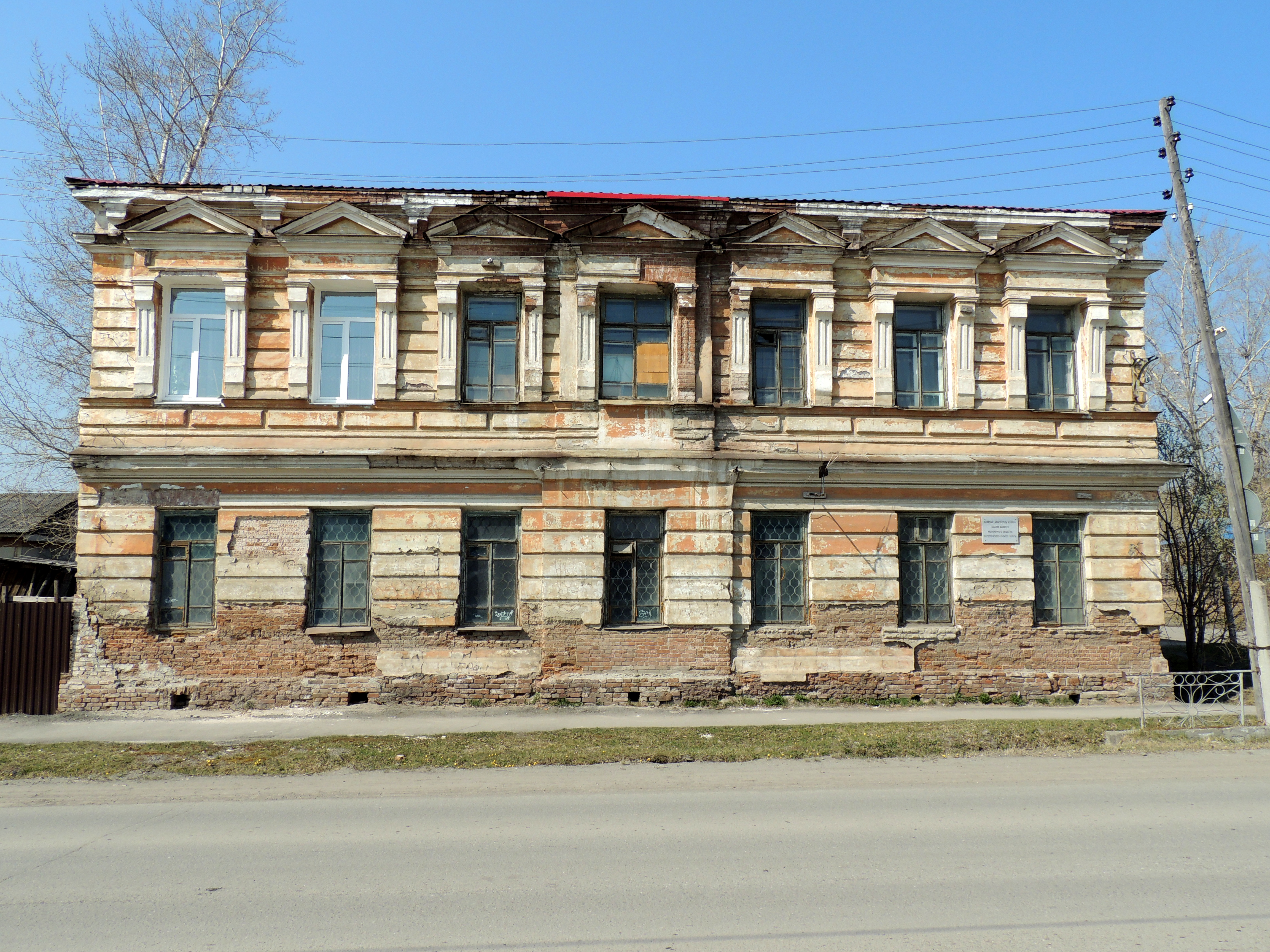 Здание управления Богословским горным округом